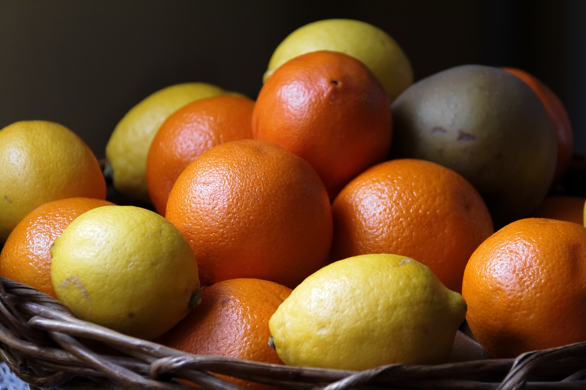 Fruits exotiques